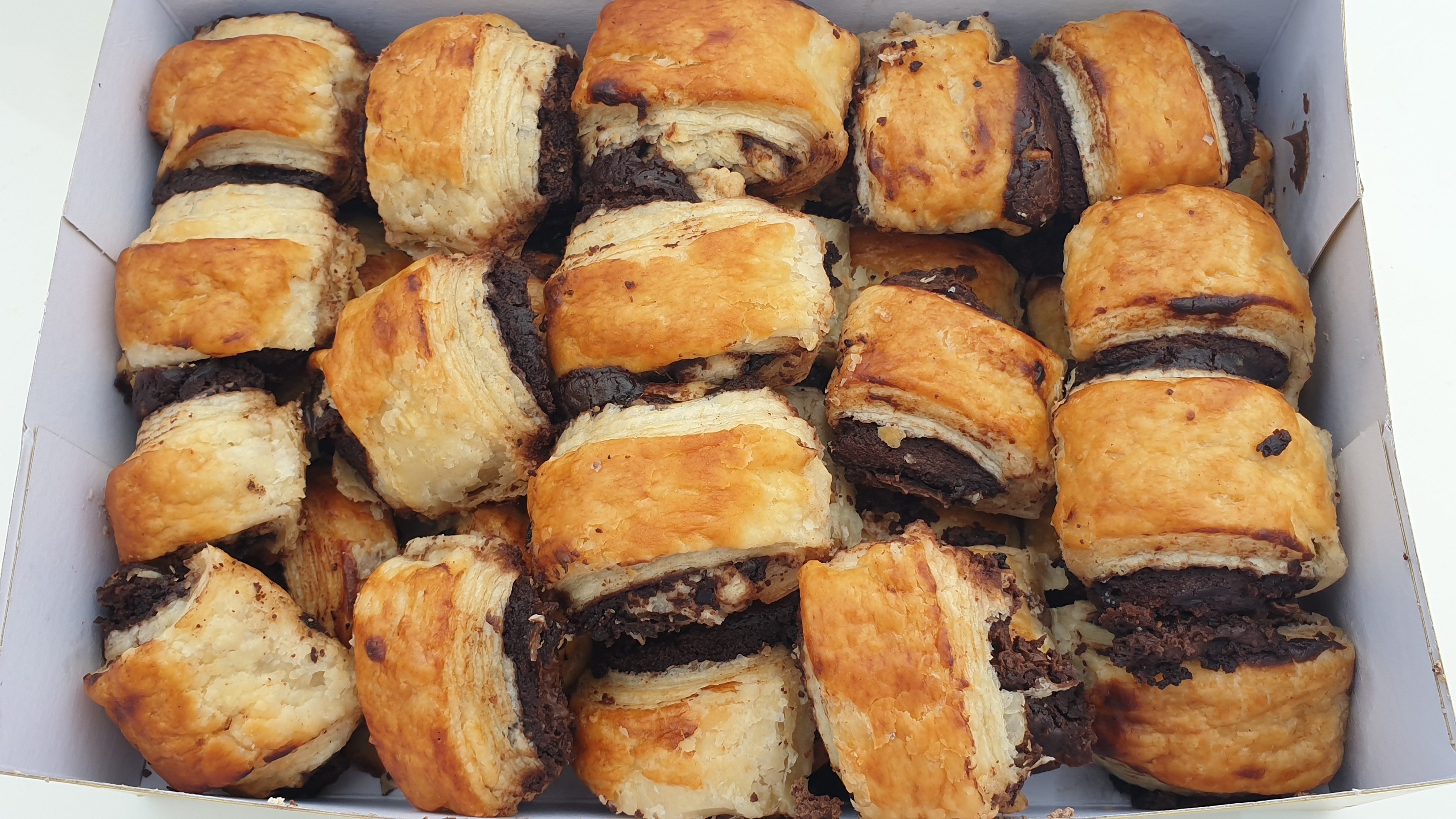 Garroticos. Caja